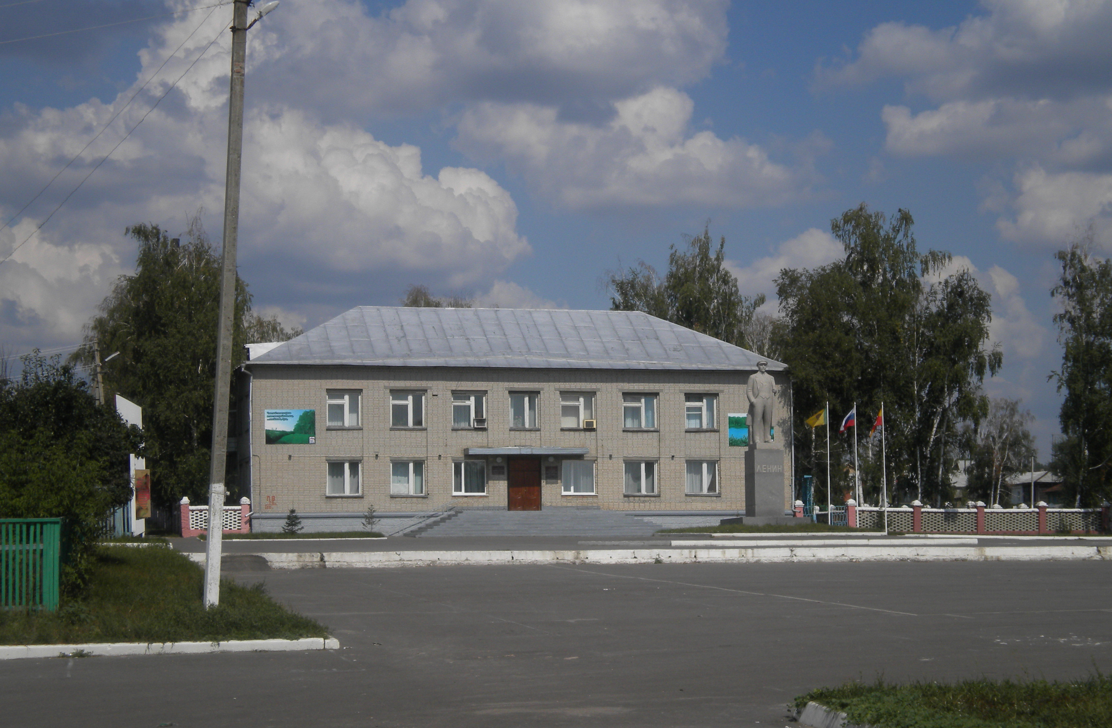 Беково. Районнаяа дминистрация. 2012 год